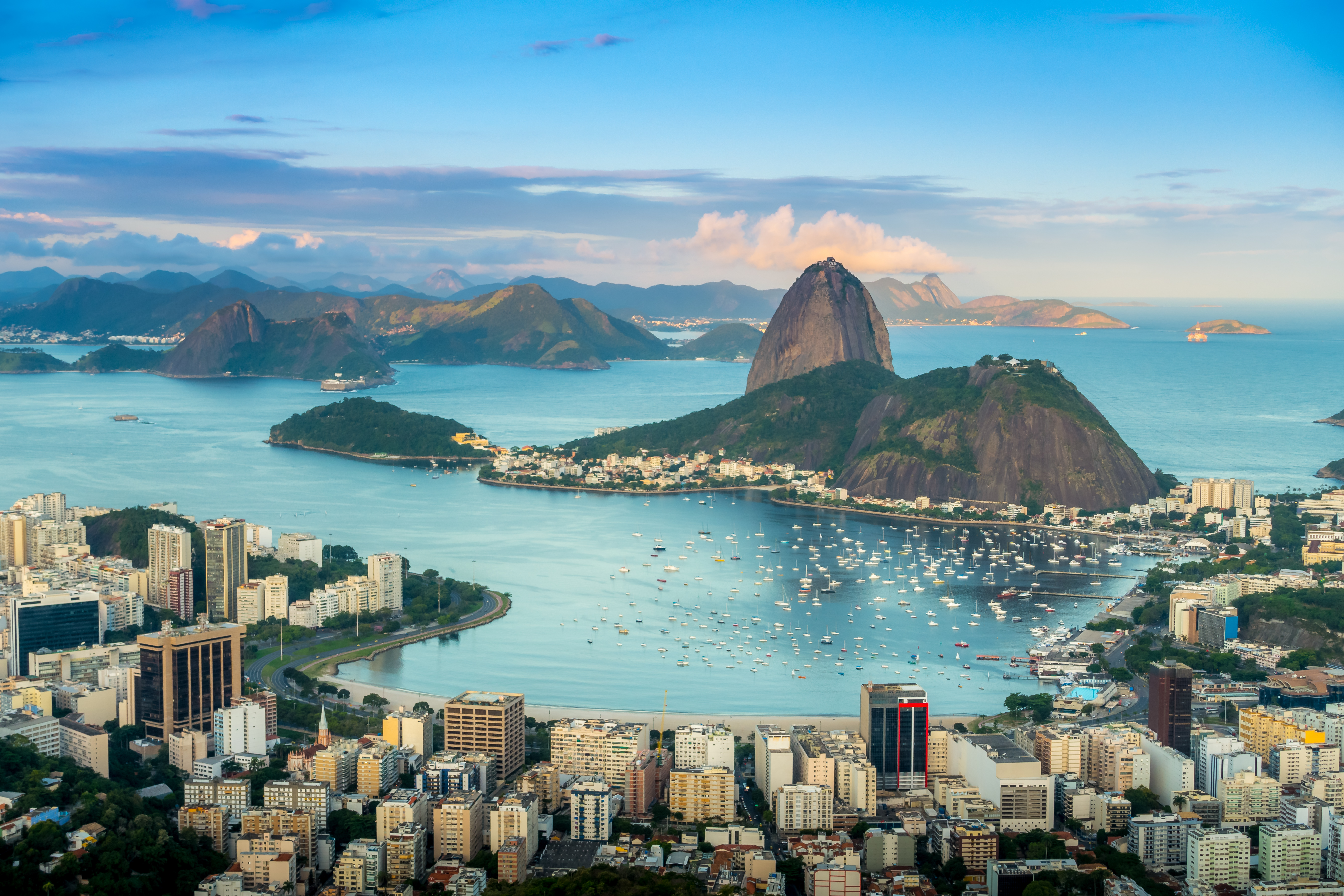 Esta é vista mais linda do Rio de Janeiro. Dá para entender o carinhoso apelido de Cidade Maravilhosa!